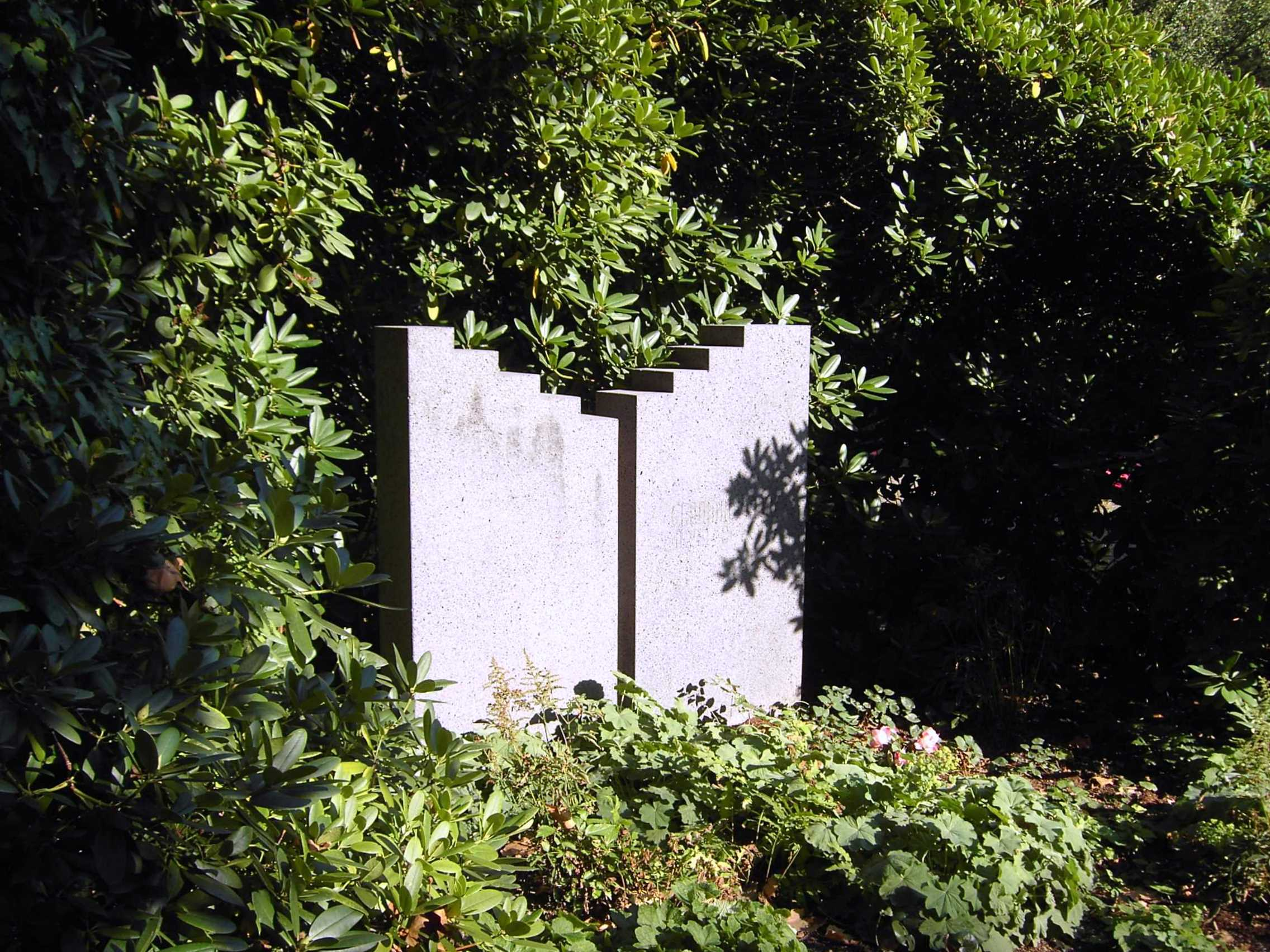 Grabstein Erwin Heerich, Düsseldorf-Heerdt